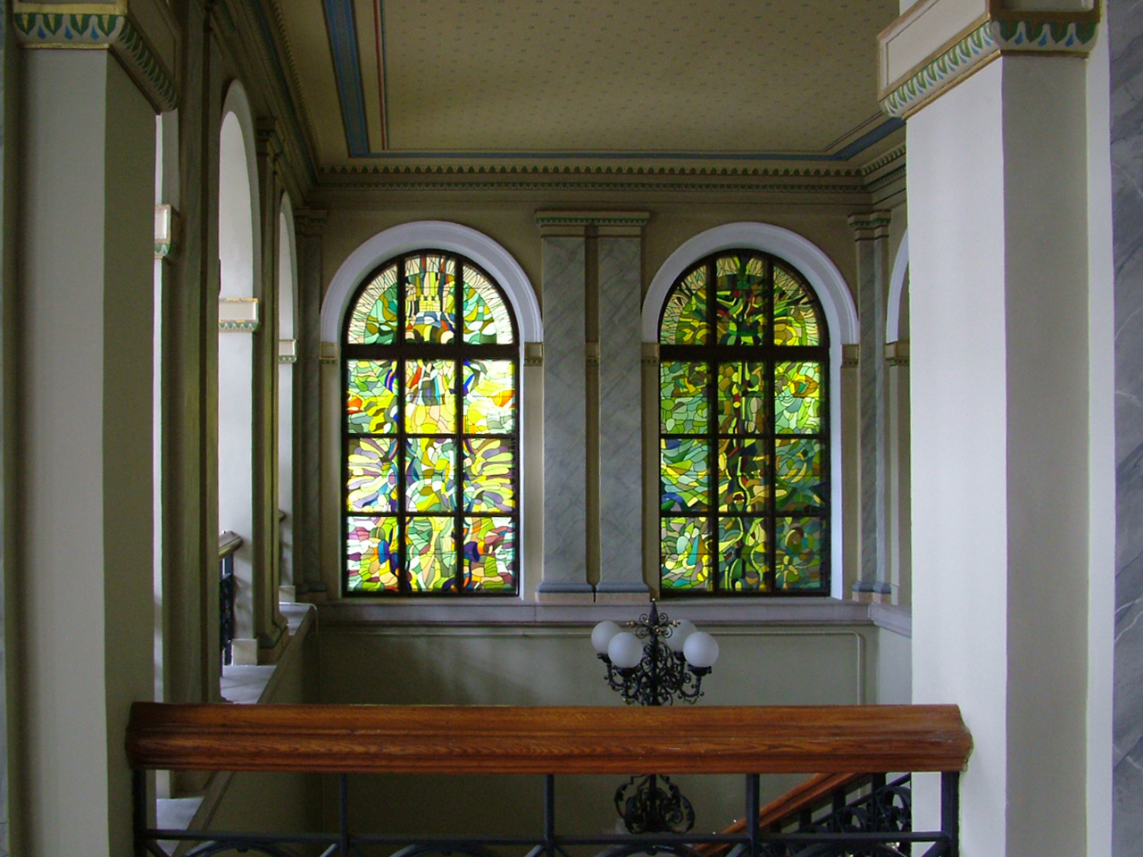 Veszprémi megyeháza, első emeleti előtér